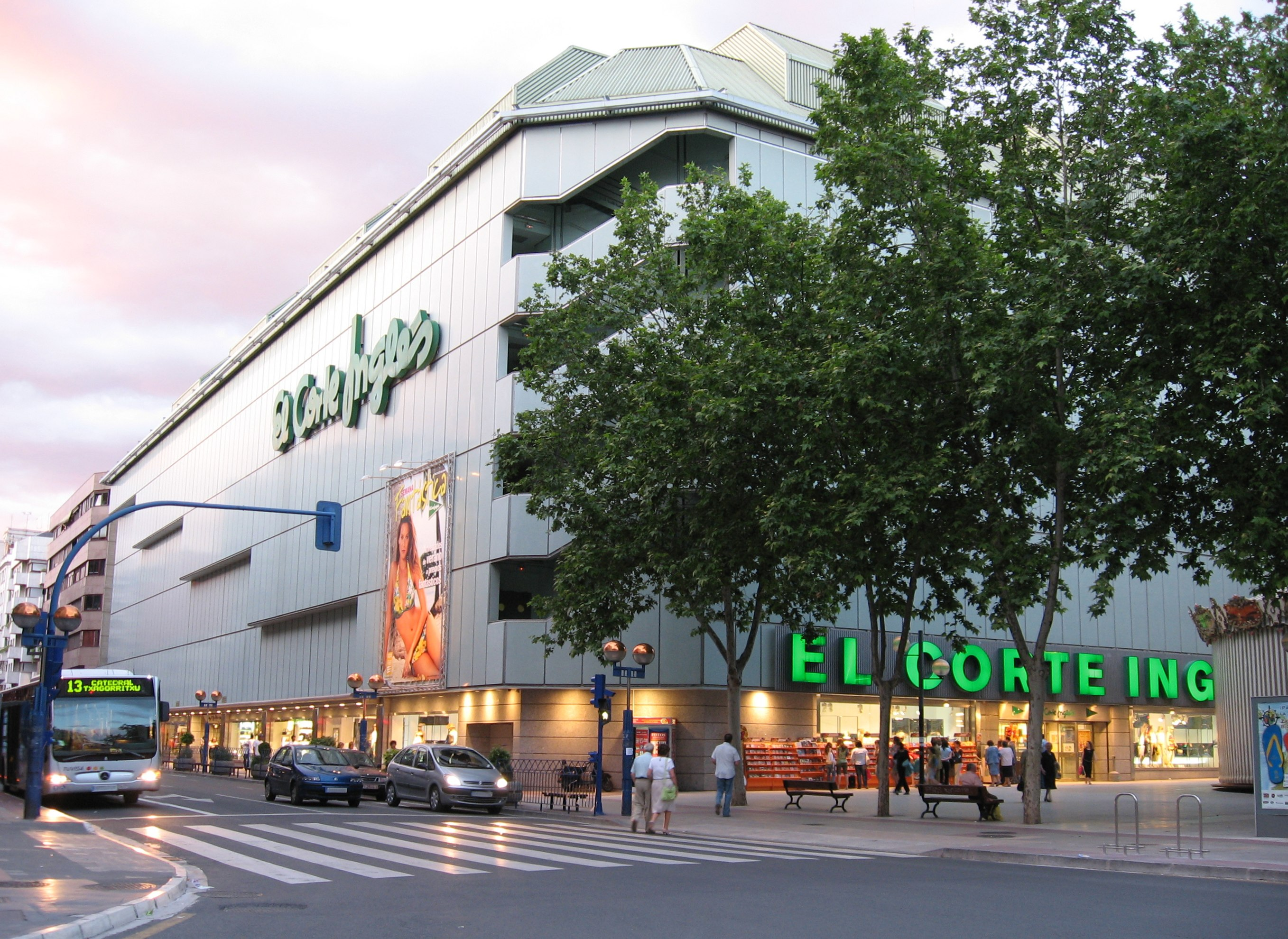 Desc: Edificio de El Corte Inglés en Vitoria-Gasteiz